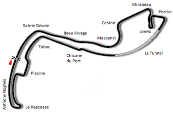 Verzia trate z rokov 1973 až 1975.